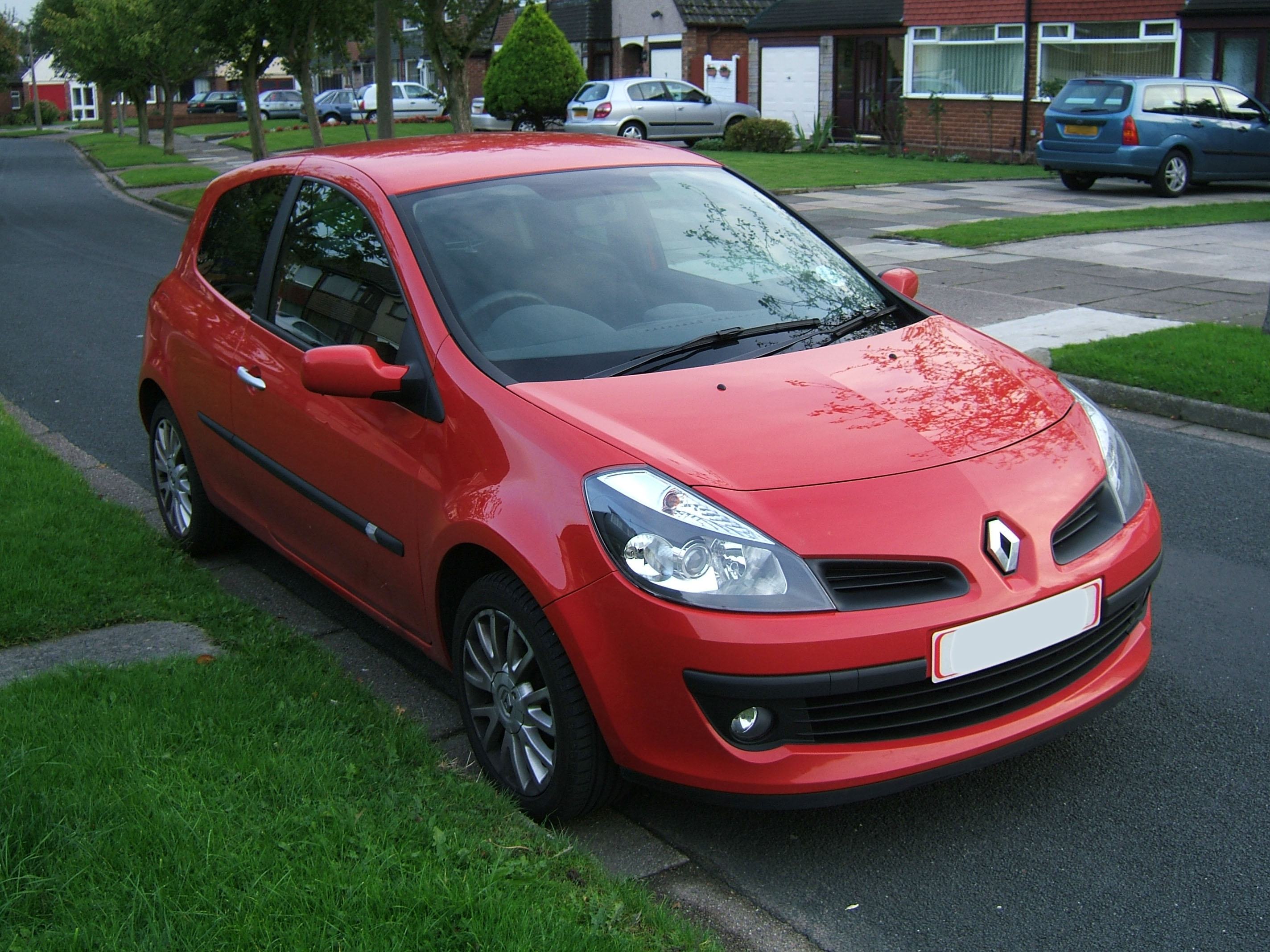 Renault Clio III